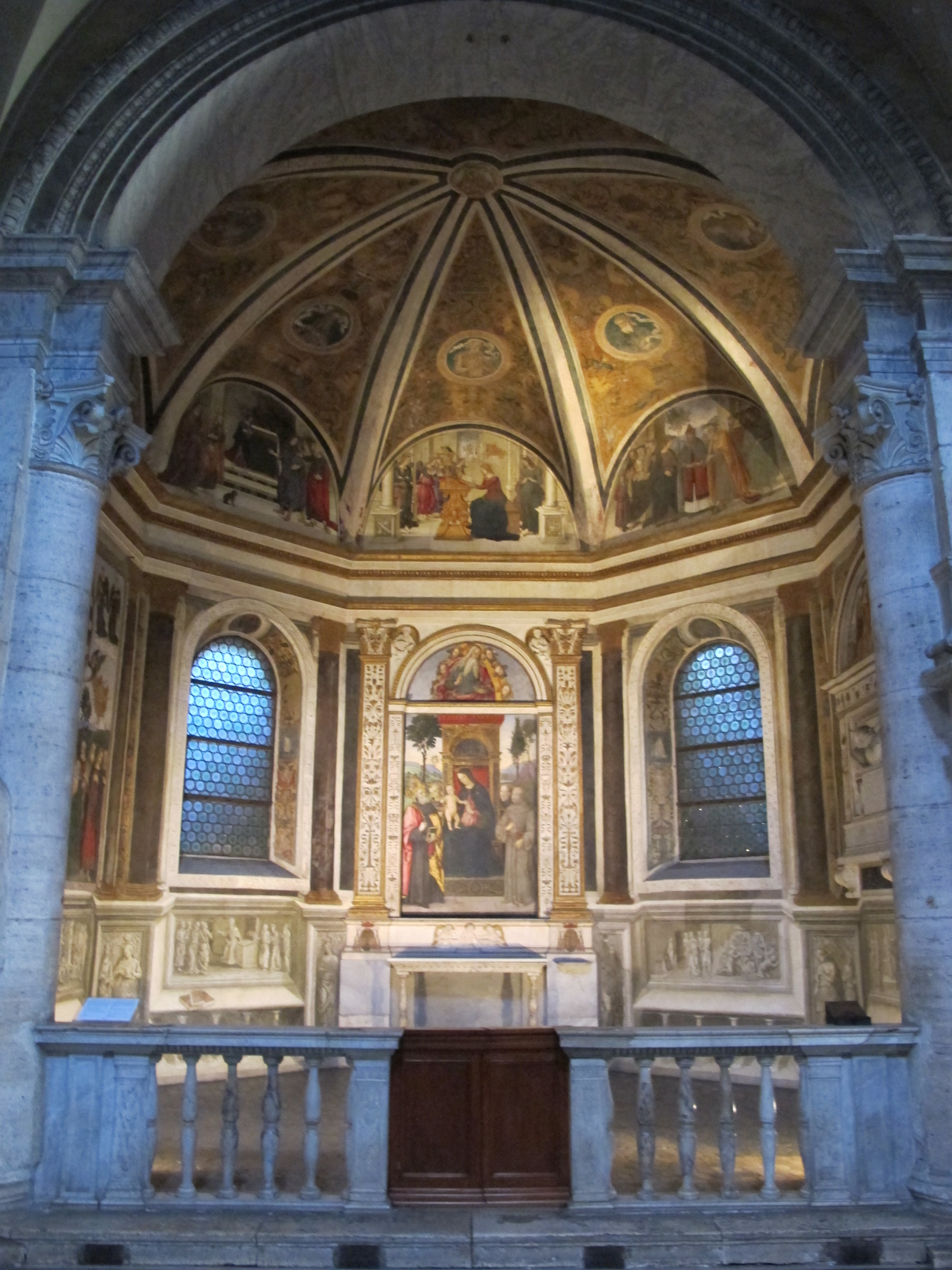 Cappella basso della rovere